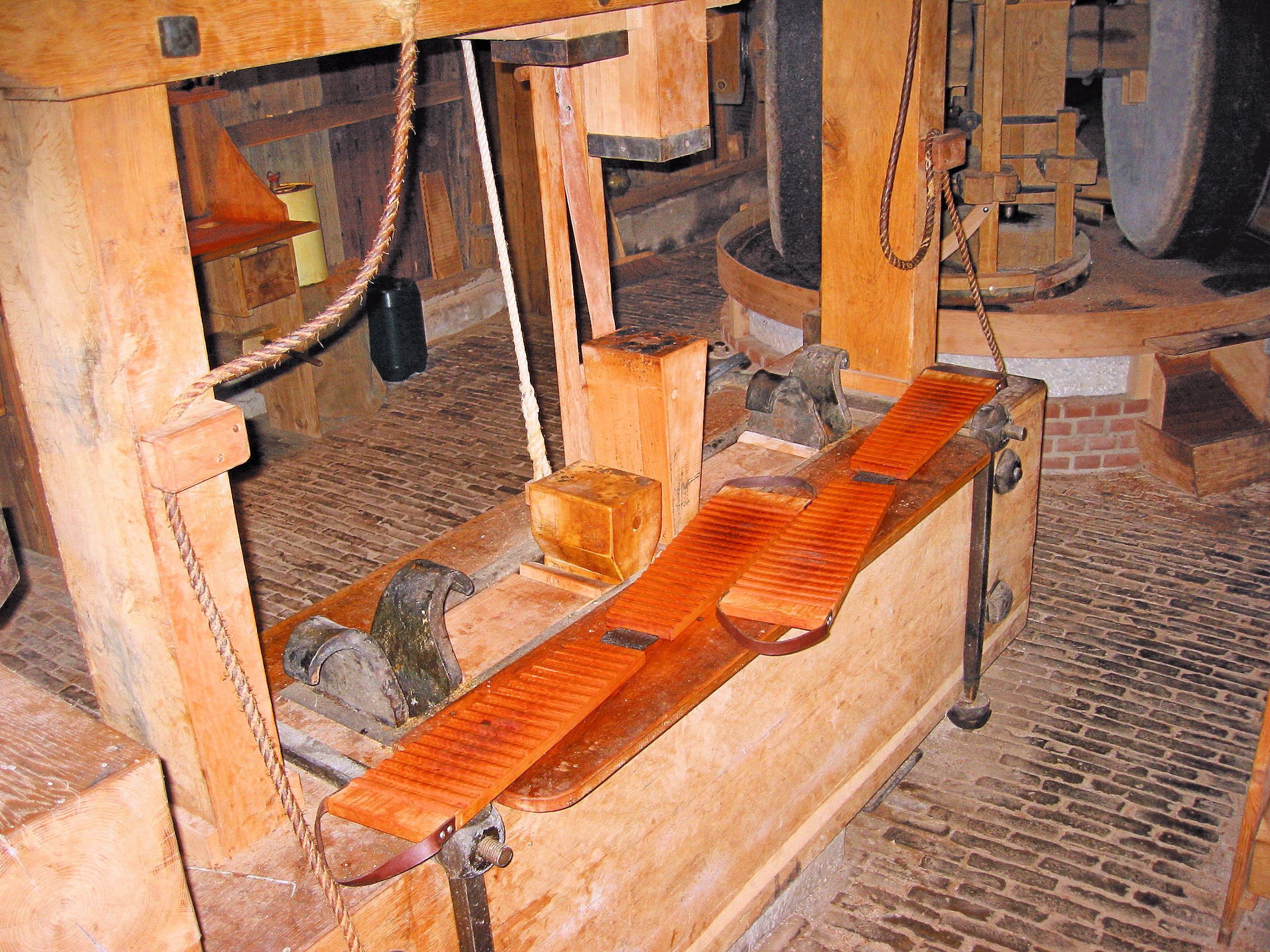 Collse Watermolen, voorslagblok met haren, Eindhoven-Tongelre, the Netherlands